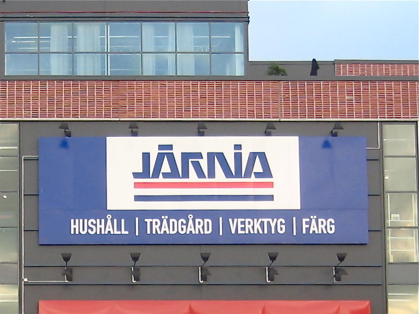 Reklamskylt för Järnias butik i Sickla.